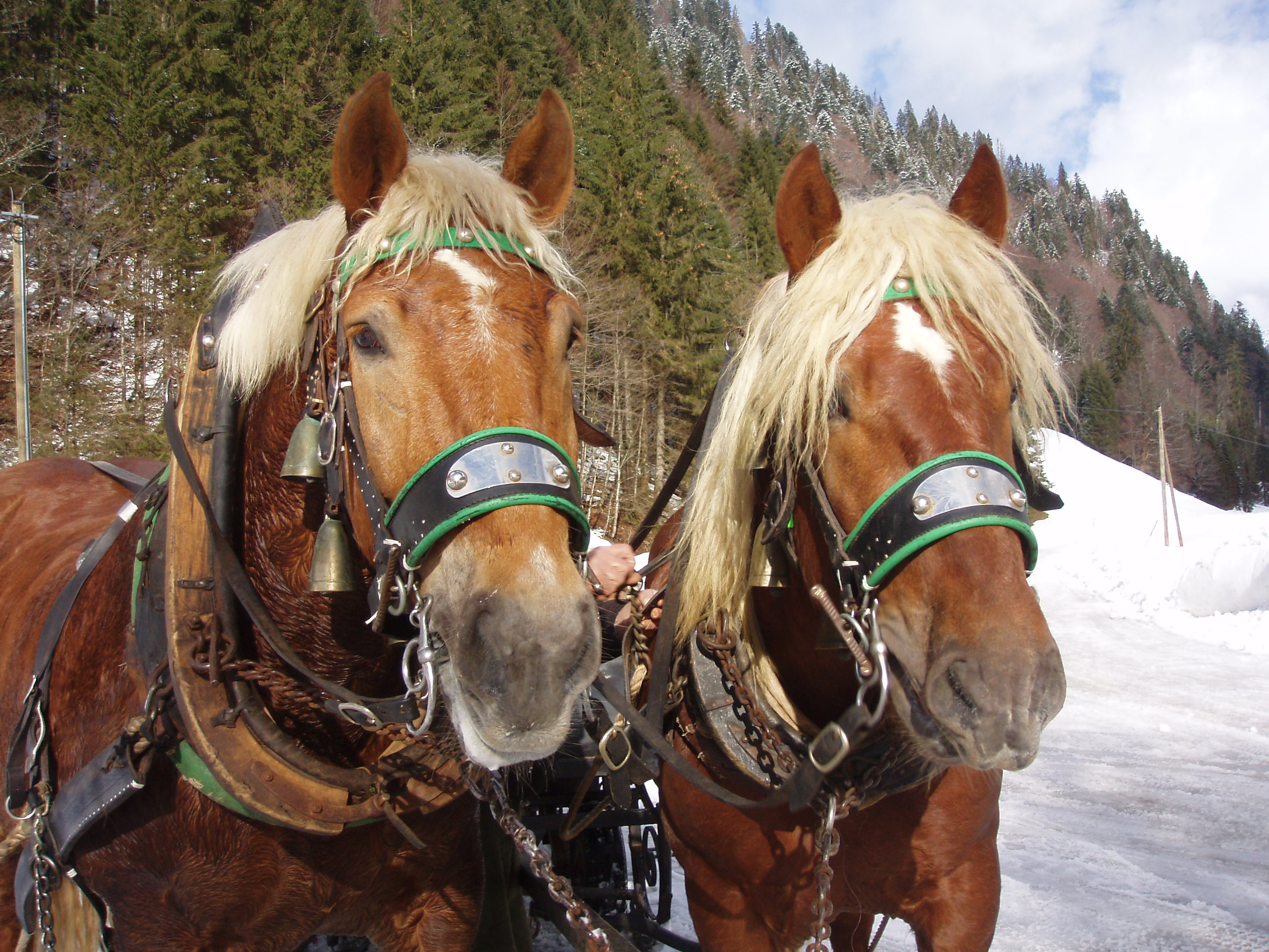 Schlittenpferdegespann nach getaner Arbeit